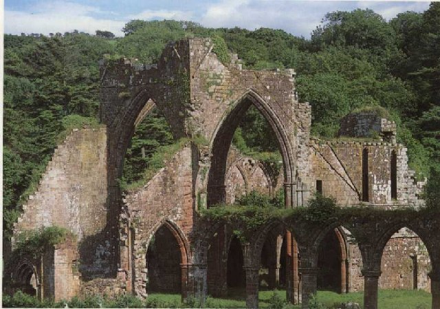 Calder Abbey, St Bridget Beckermet